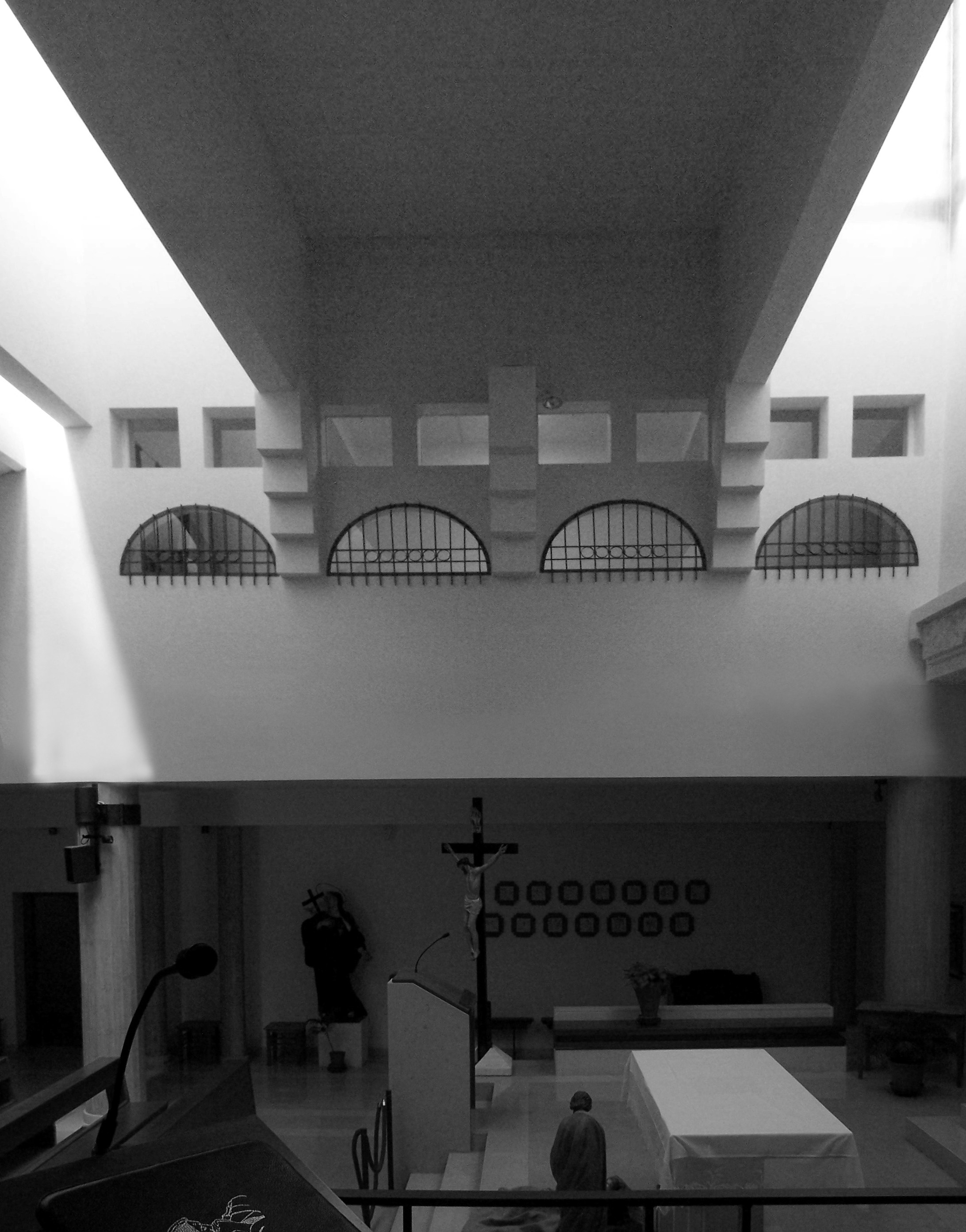 Interno della Chiesa del Monastero di Betlem di Foligno. Parete laterale, con soffitto e lucernai (vista dal coro)